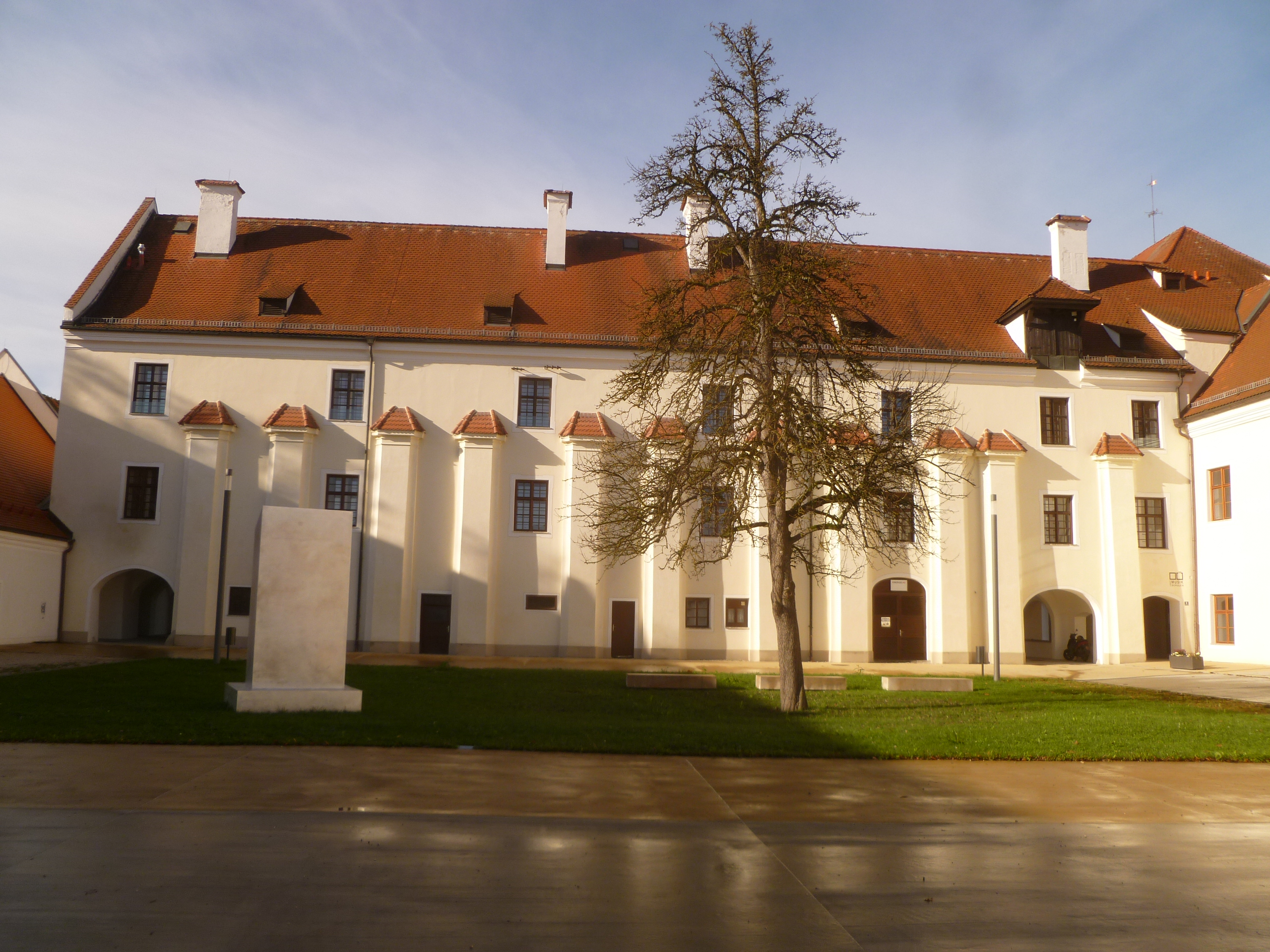 Gesamtanlage des ehem. Augustiner-Chorherrenklosters Ranshofen: Pfarrkirche (Stiftskirche), "Schlössl" (Klostertrakte), Meierhof, Friedhof mit Karner, Einfriedungsmauern mit Portalanlagen, Gartenbaudenkmale im ehem. Konventgarten; Reste von Vorgängerbauten